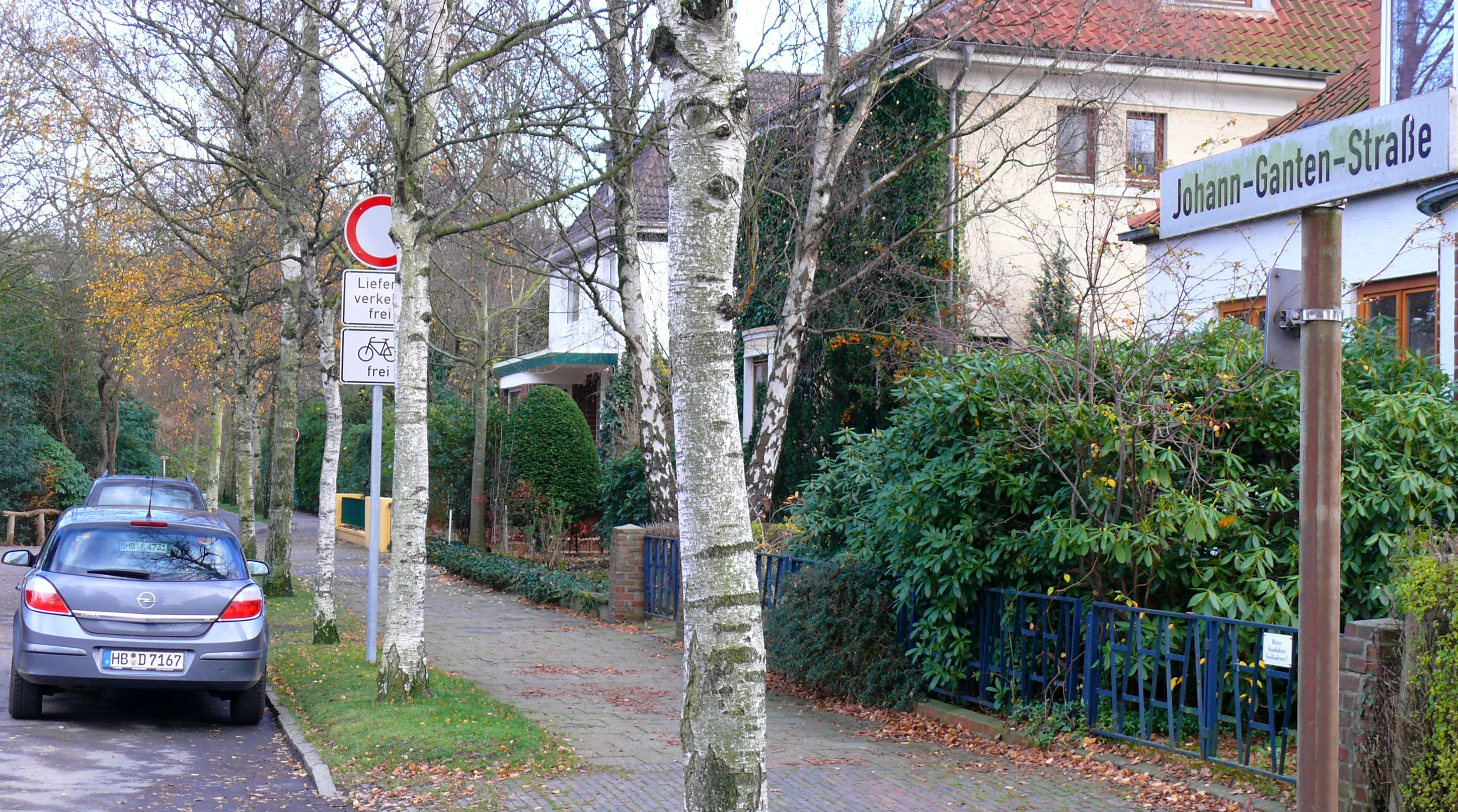 Johann Ganten Straße am Eingang zum Bürgerpark in Bremerhaven